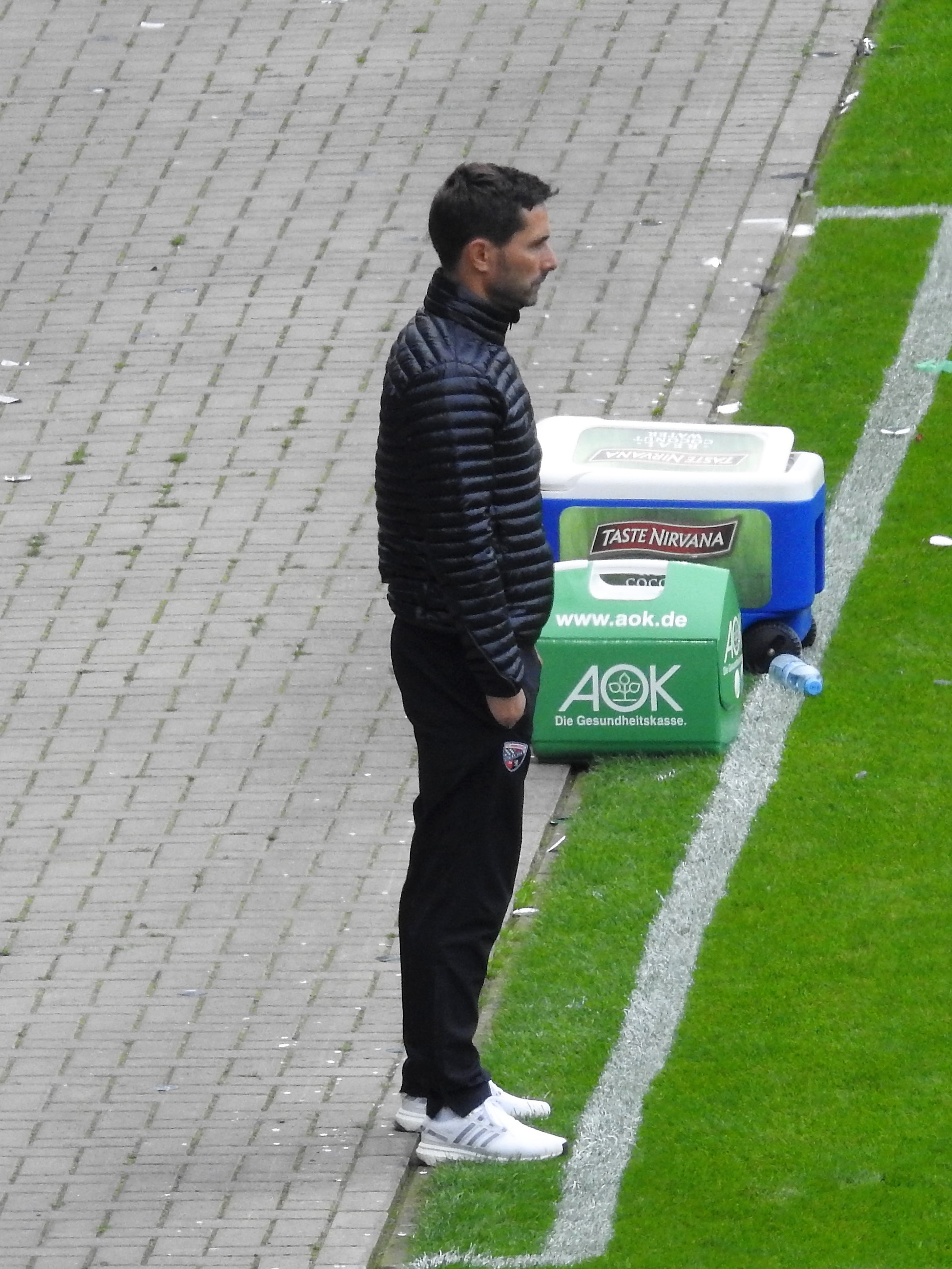 Leitl, Stefan Trainer Ingolstadt 17-18